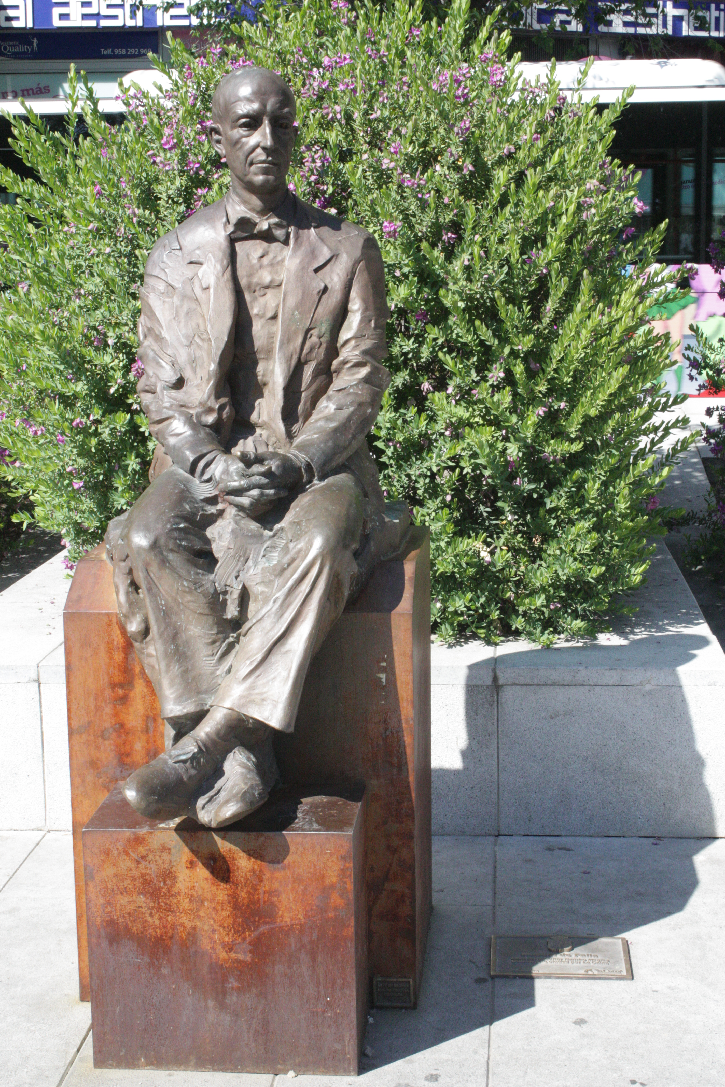 Estatua de Manuel de Falla en la Avenida de la Constitución de Granada (España).